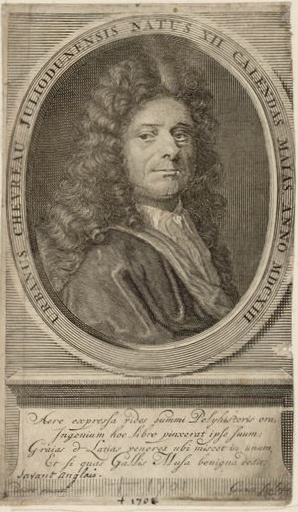 Urbain Chevreau (mort en 1701)